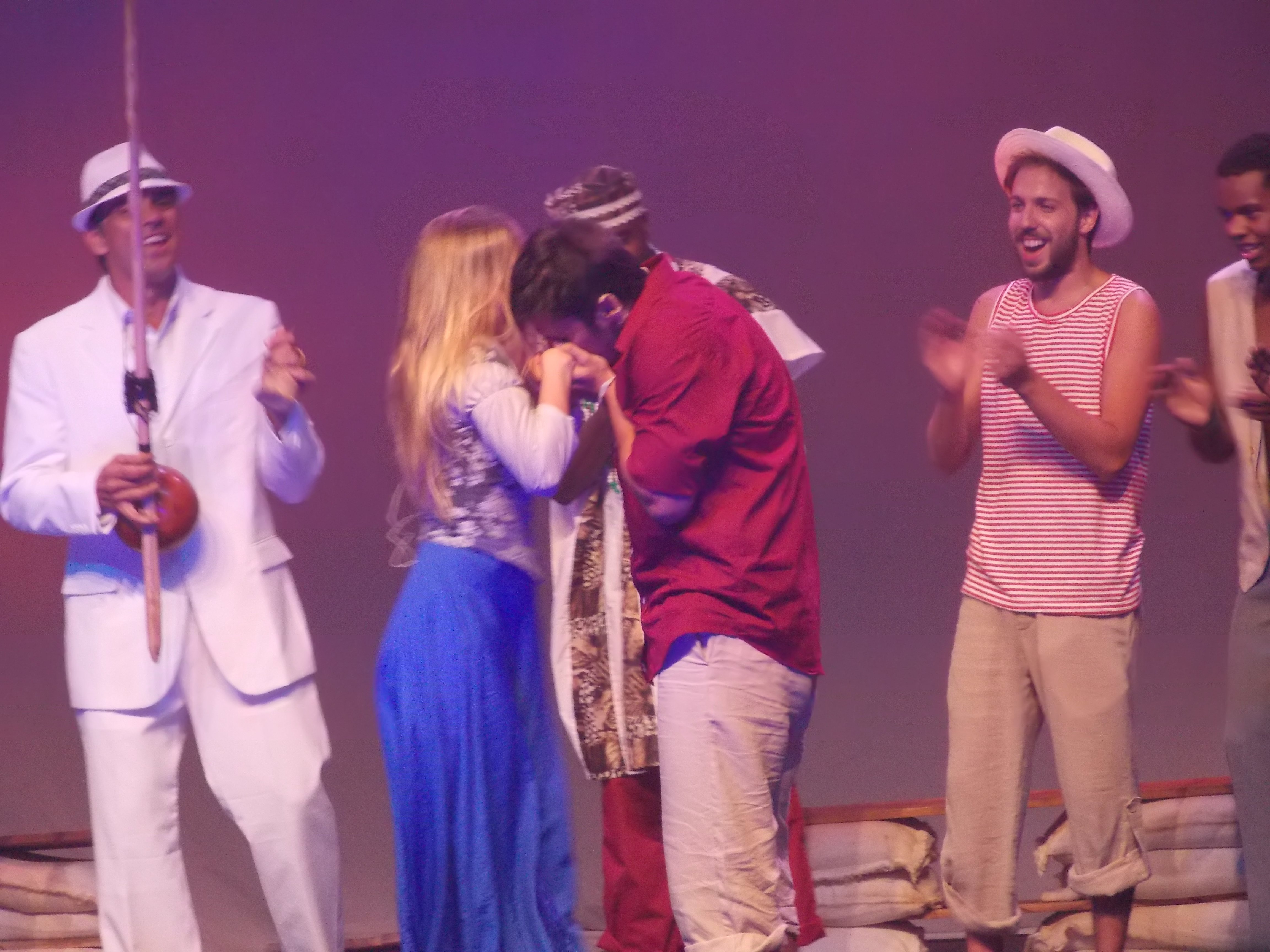 Evento: Festa Internacional de Teatro de Angra. Peça: Romeu na Roda. Elenco: Bruno Gissoni, Daniela Carvalho, Rafael Zulu, Marcos Breda, Rodrigo Simas, Felipe Simas e Beto Simas (Mestre Boneco).